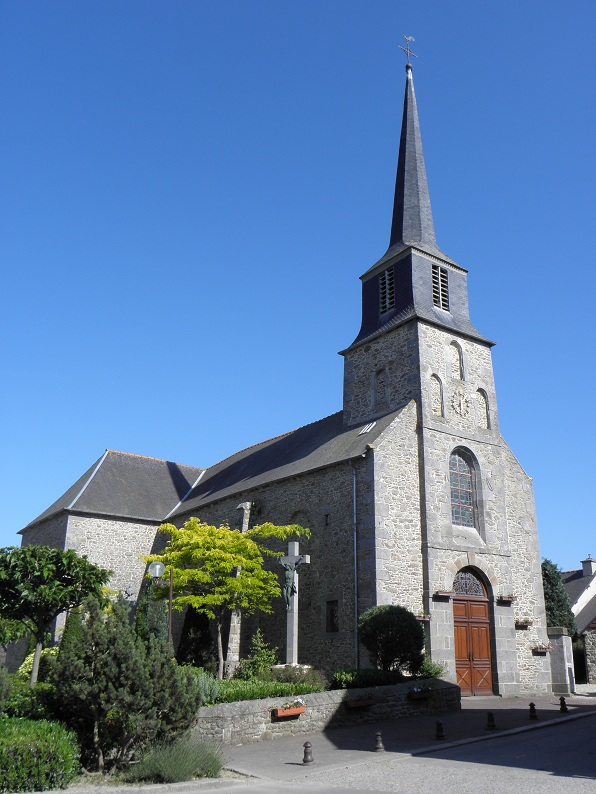 Église Saint-Guinou à Saint-Guinoux (35).